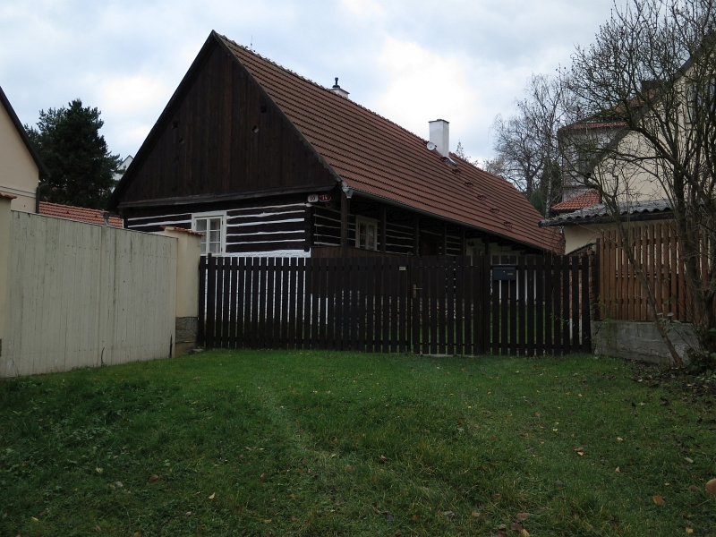 Bolevec čp. 10, Plzeň 1-Bolevec, Bolevecká náves 10/14, Plzeň.